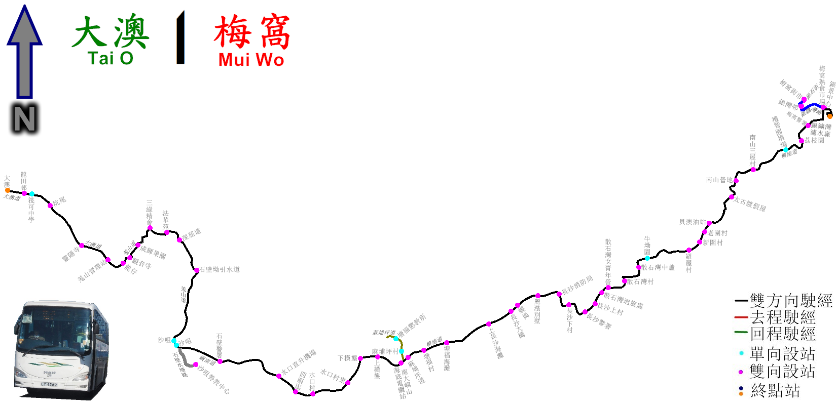 中文（香港）: 新大嶼山巴士1路線的走線圖